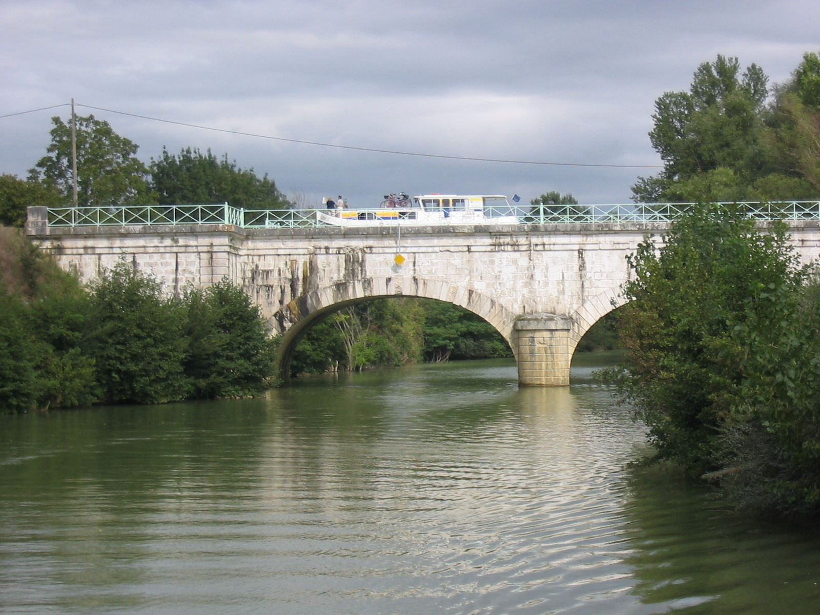 Die Baïse überquert von Kanalbrücke des Garonne-Seitenkanals.